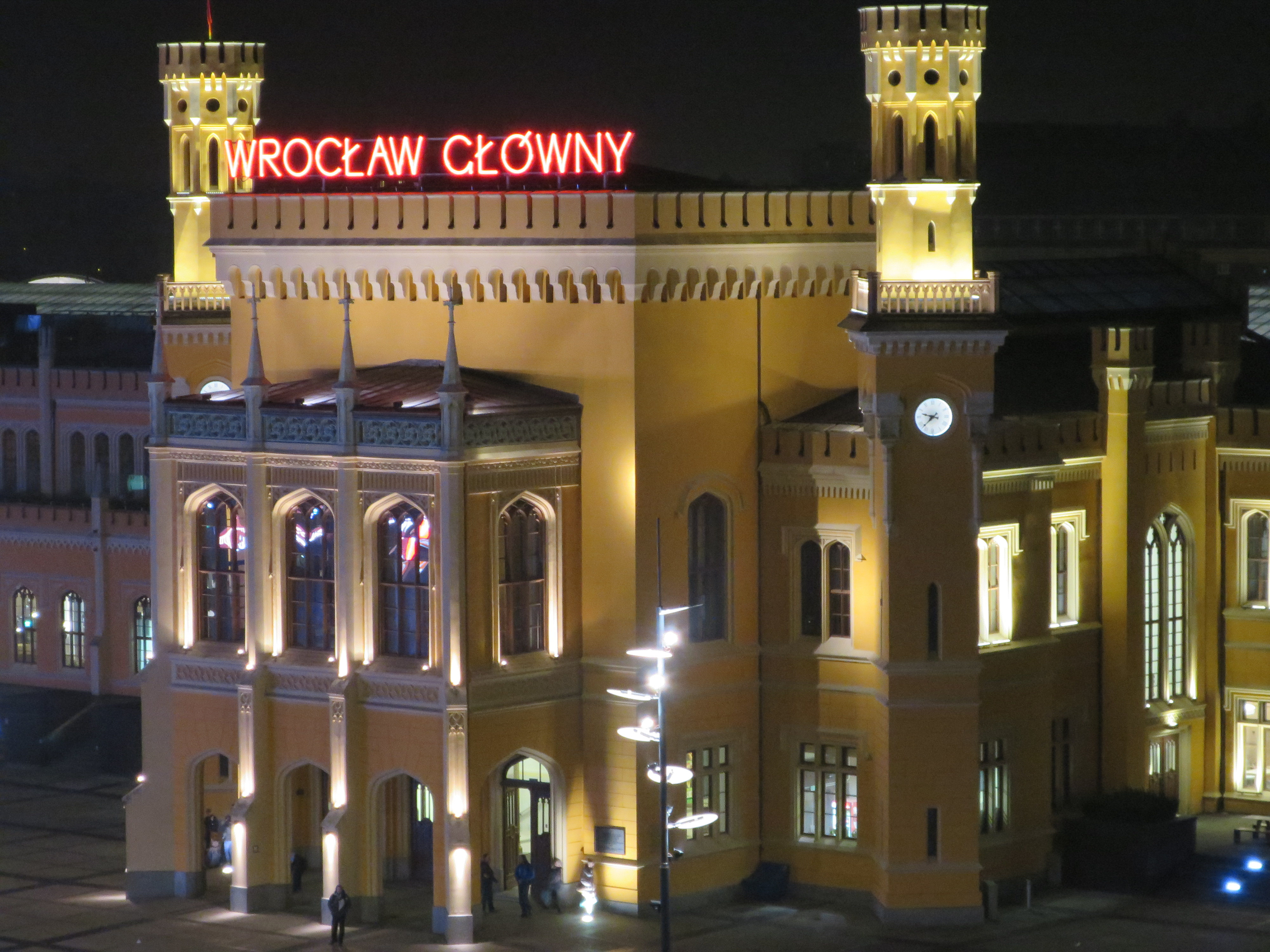 Wrocław Główny (widok z Hotelu Piast)